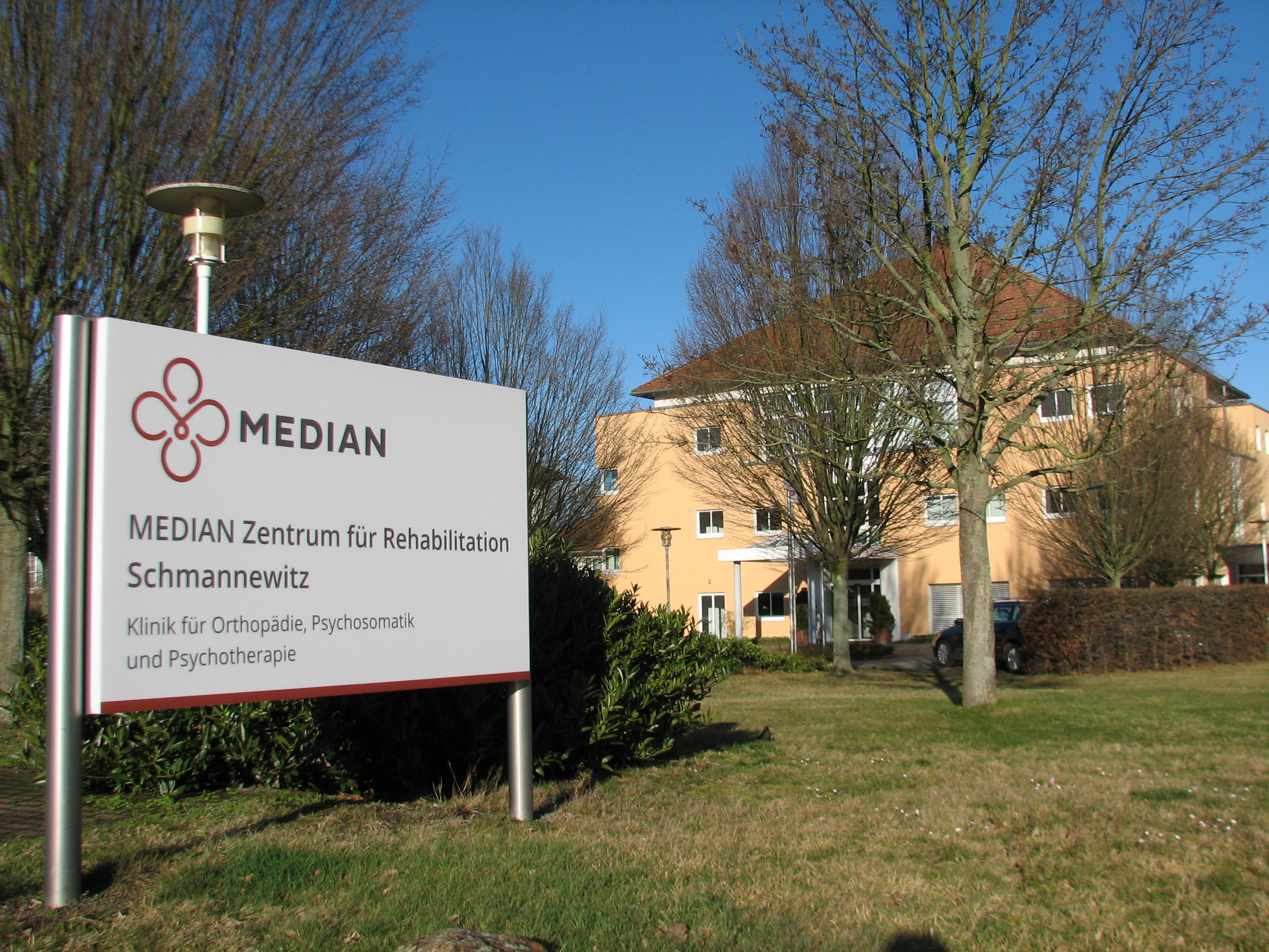 Median-Zentrum für Rehabilitation mit zwei Kliniken nebeneinander